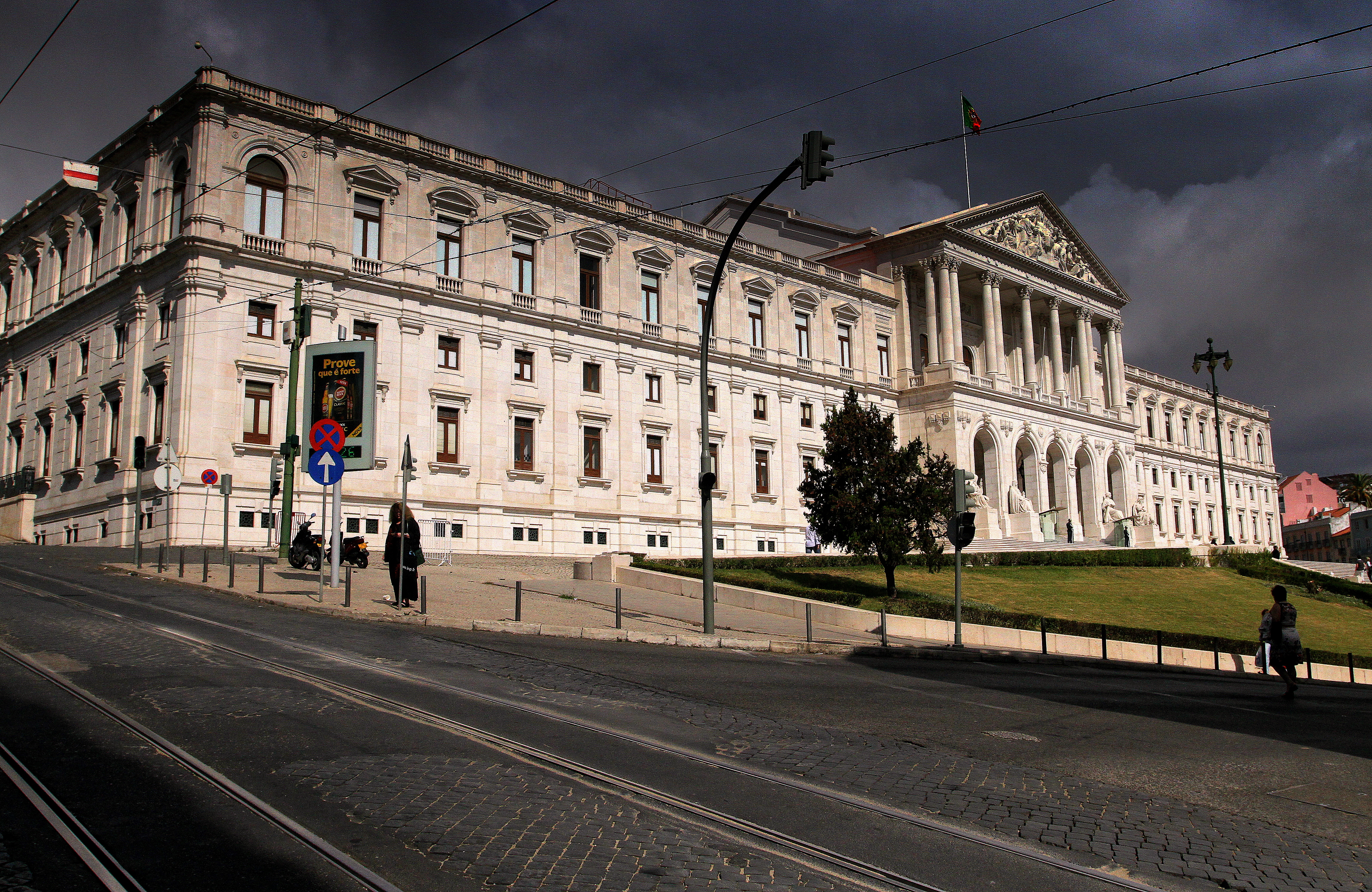 Palácio de S. Bento This file was uploaded for Wiki Loves Monuments in Portugal with the unique identifier 70140.